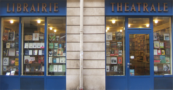 Paris (Île-de-France, France) : Vitrine de la Librairie Théâtrale.